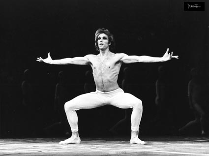 Jorge Donn- IX symphonie de Beethoven - Maurice Béjart- Ballet du XX ème siècle- Forest National- Bruxelles 1976